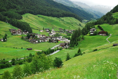 Predoi - Prettau, il comune più a nord d'Italia.